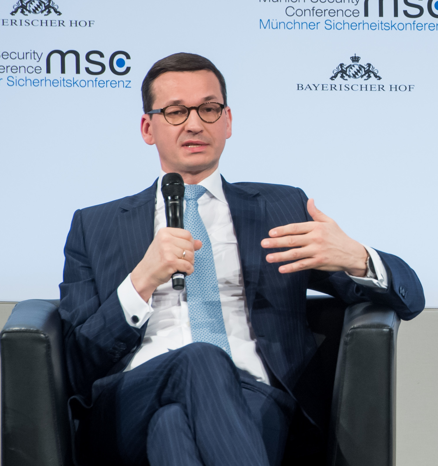 Mateusz Morawiecki und Sebastian Kurz während der Münchener Sicherheitskonferenz 2018